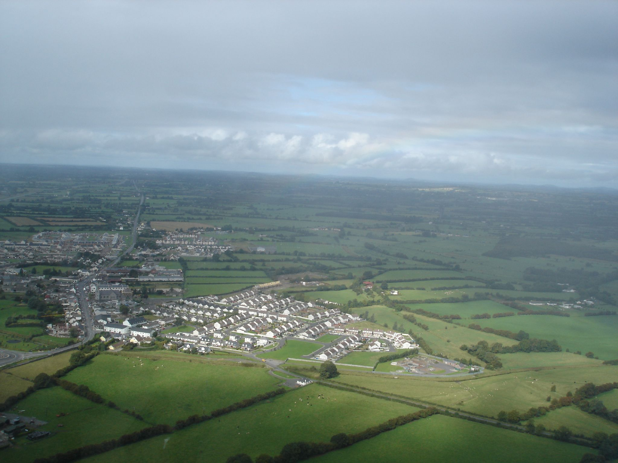 Панорамен изглед на Килкок Източник: Автор: Matthew Verso